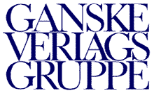 Logo Ganske-Verlagsgruppe